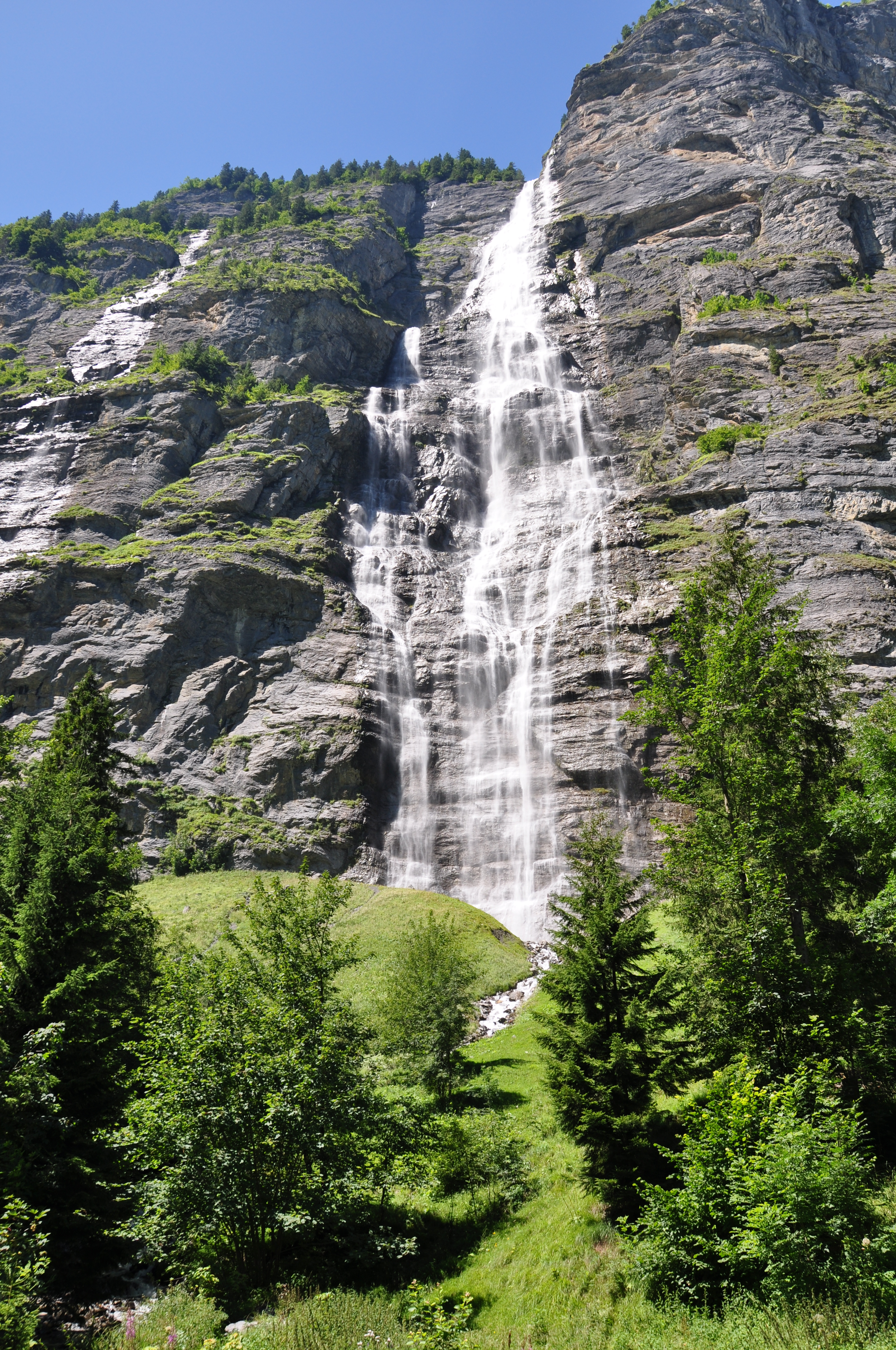 Switzerland, Canton of Bern, Mürrenbachfall (highest waterfall of Switzerland)